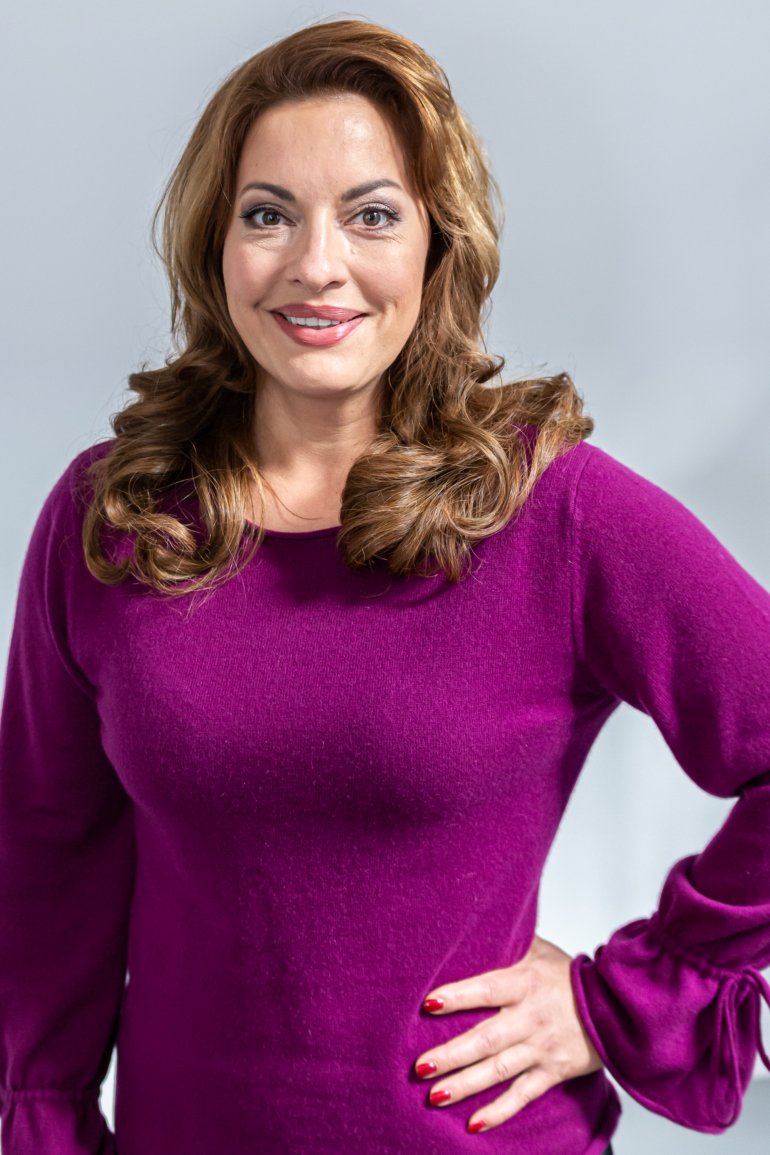 TV, ARD, Cast "Rote Rosen" Staffel 16; Julia Dahmen